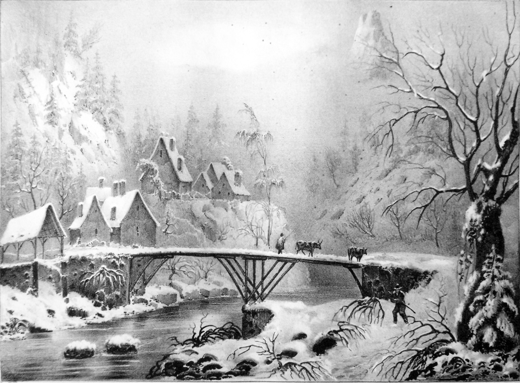 Livet près du Bourg dOisan (Isère)ATTENTION ! Ce facsimilaire n'est pas parfaitement réussi, cependant il peut être utilisé pour étudier les différences entre les deux versions du tome I.